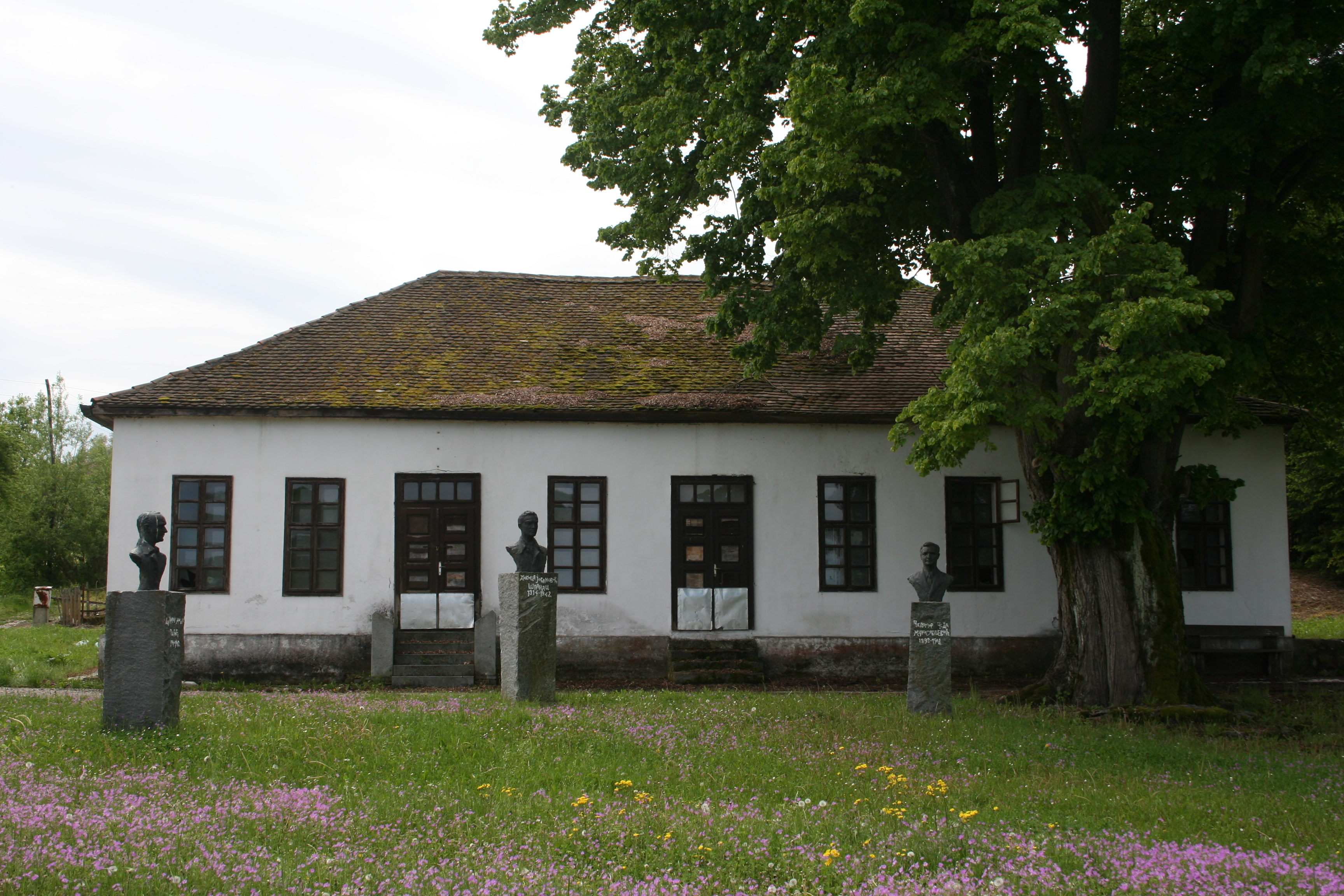 Spomen kompleks Bela Crkva